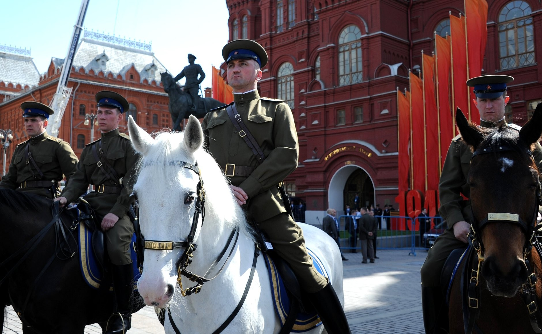 Перед началом военного парада в ознаменование 70-й годовщины Победы в Великой Отечественной войне 1941–1945 годов.